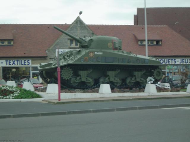 Char du débarquement du 6 juin 1944. Ce char a en réalité coulé avec tout son équipage. Il a été restauré en mémoire du débarquement qui a eu lieu à Courseulles sur Mer. 2005. Cevenol2